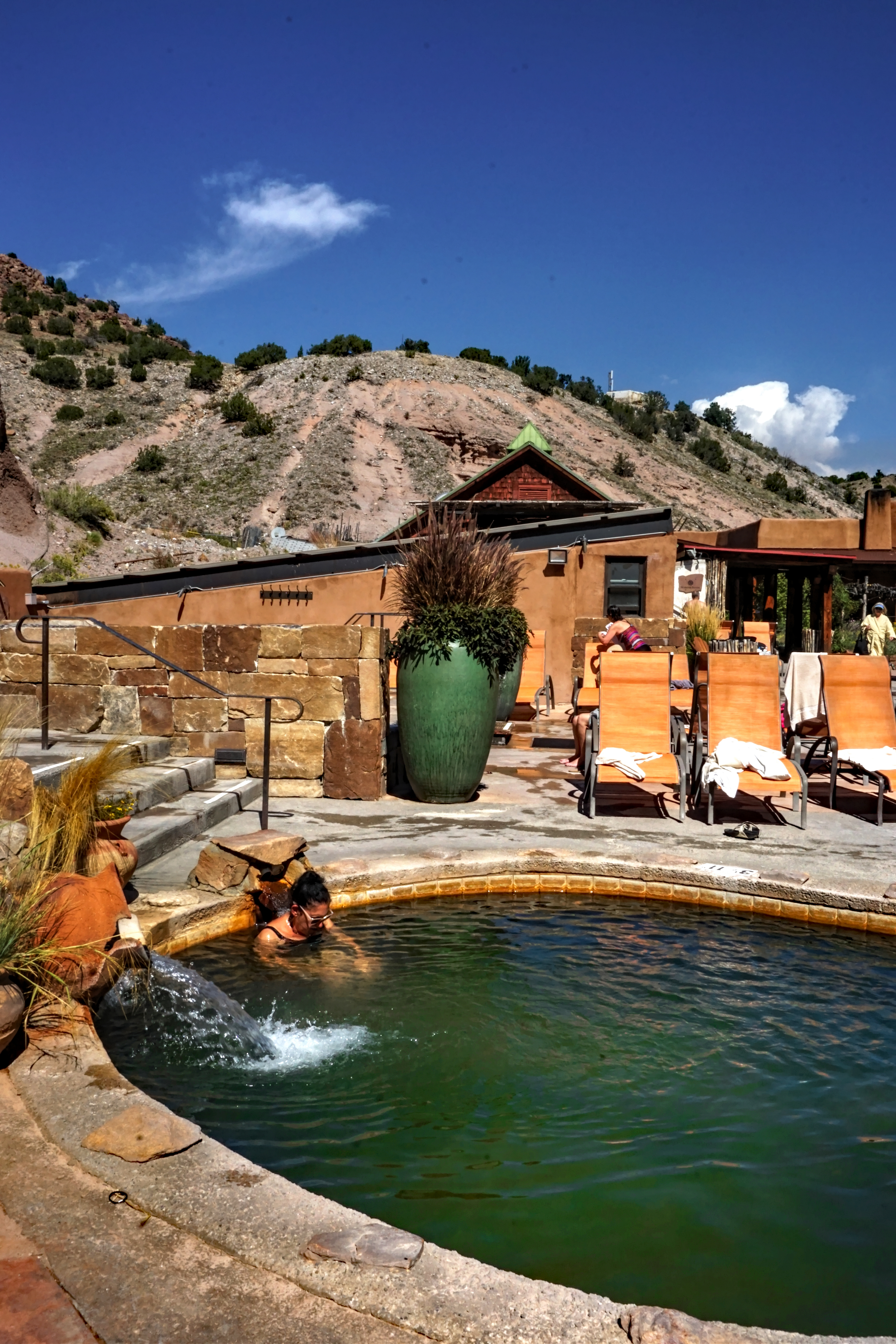 Ojo Caliente, New Mexico